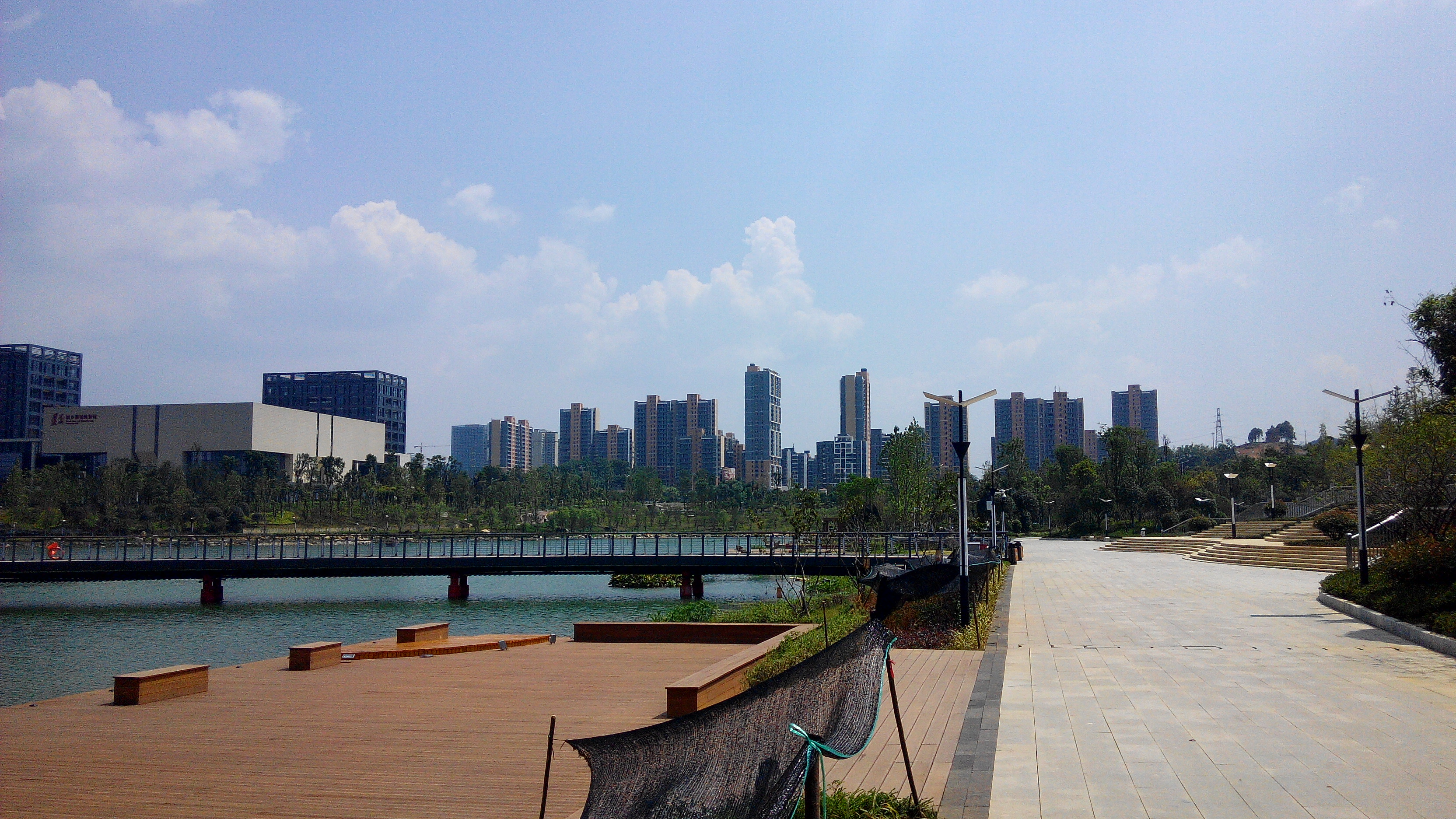 遵义新蒲镇天鹅湖人民公园及周边建筑